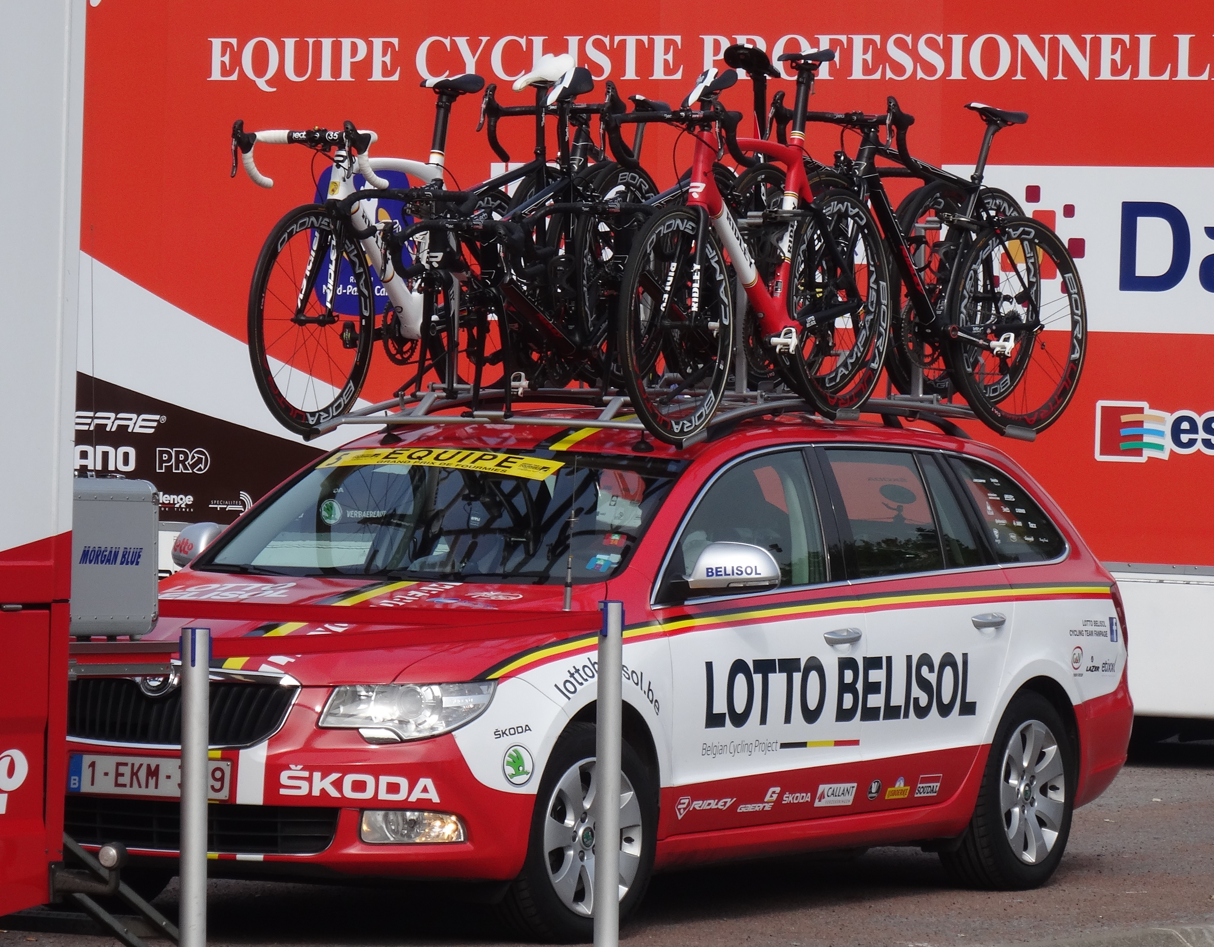 Reportage photographique réalisé le dimanche 7 septembre à l'occasion du départ et de l'arrivée du Grand Prix de Fourmies 2014 à Fourmies, Nord-Pas-de-Calais, France.